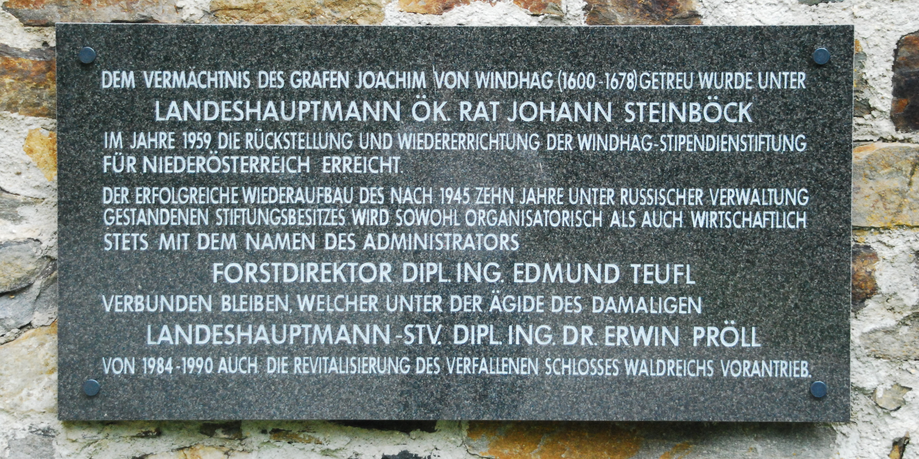 Gedenktafel am Schloss Waldreichs in Niederösterreich